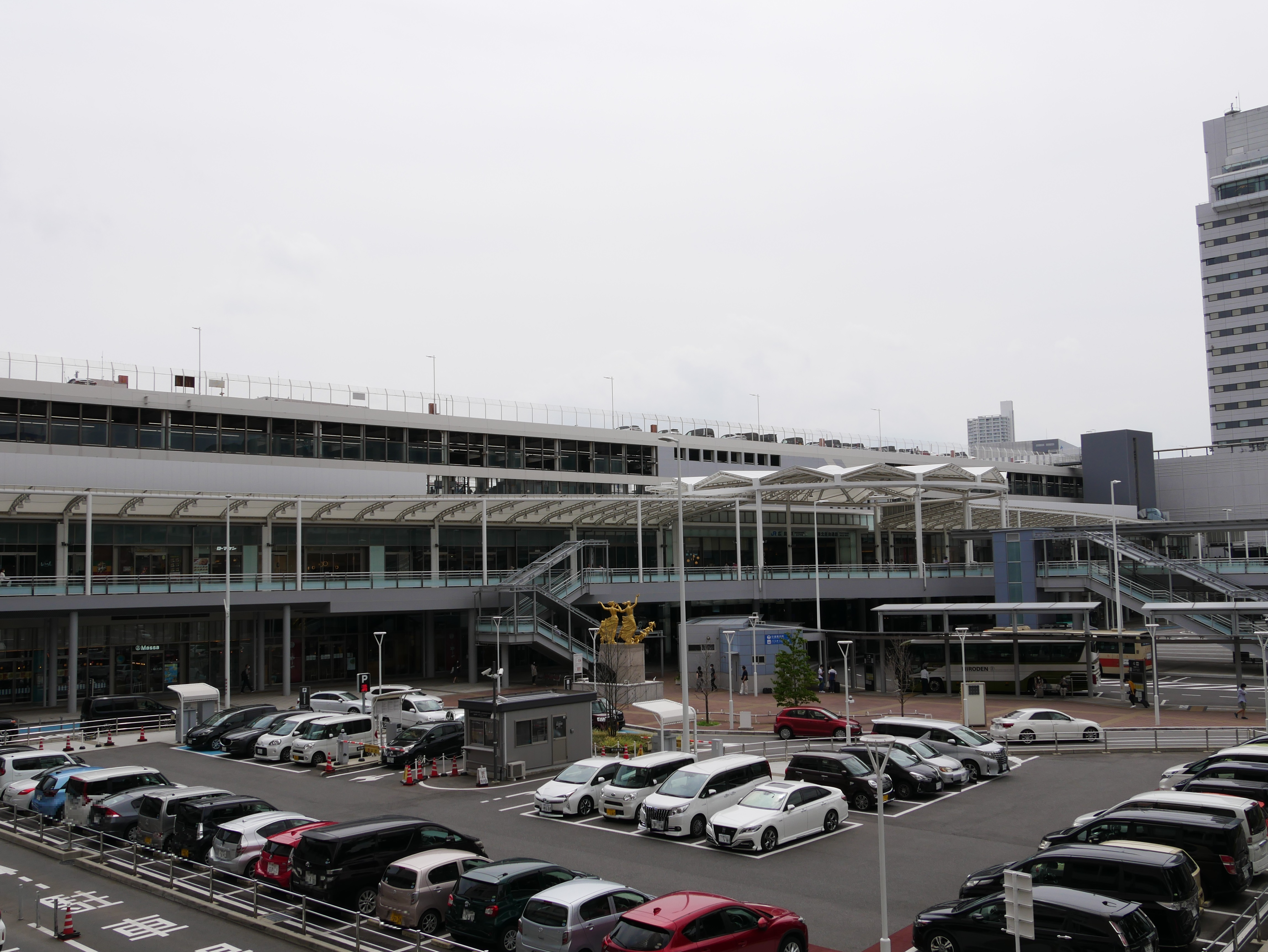 広島駅北口（新幹線口）広場 Panasonic Lumix DMC-GX7 Mark II